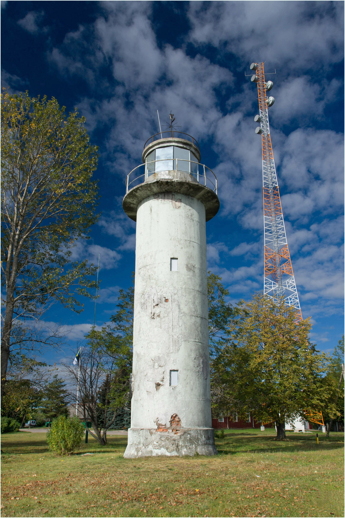 Mehikoorma tuletorn